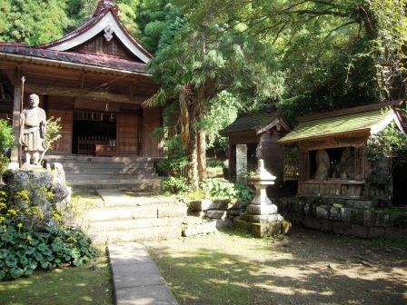 満願寺（熊本県阿蘇郡南小国町）